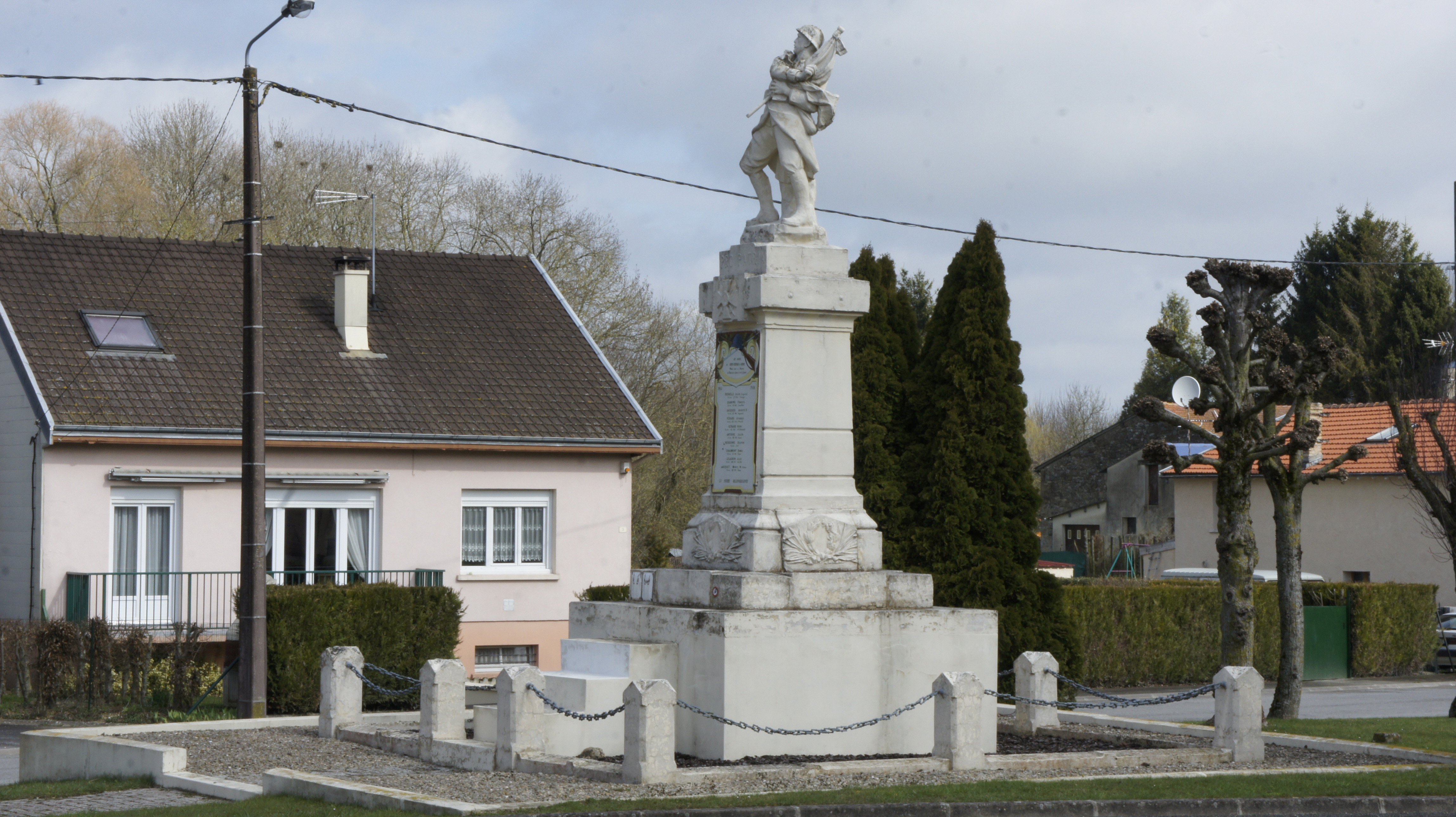 Saint_Etienne_à_Arnes, vue du_monument_aux_morts_.